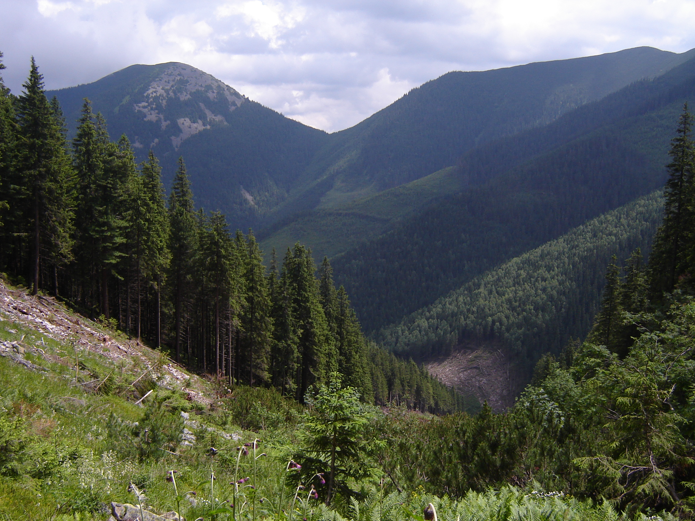 «Котелець»